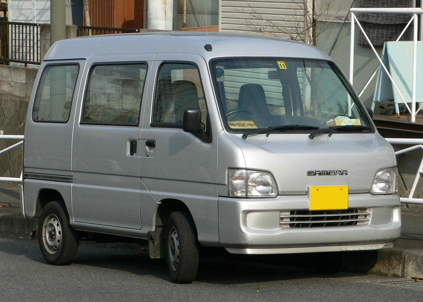 6th generation Subaru_Sambar (2001 - 2002)